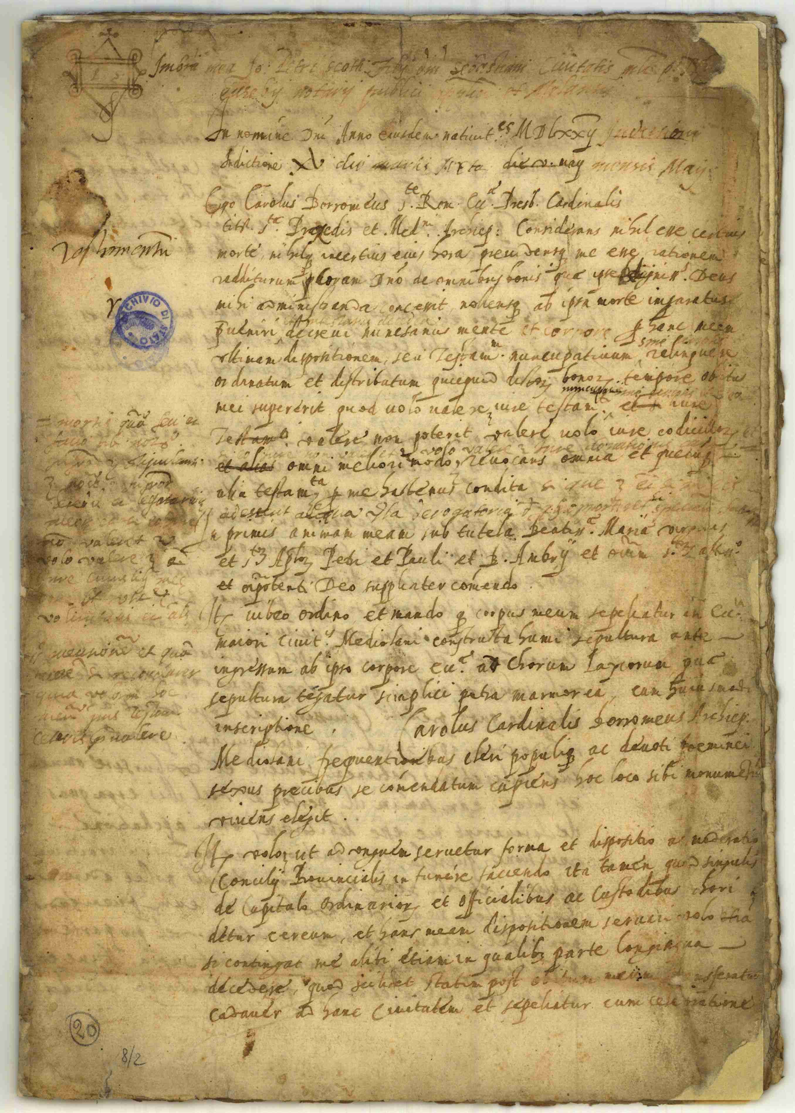 ASMi, Fondo Miniature e Cimeli, Appendice n°1, fasc. n° 8, fascicolo cartaceo di 12 carte, atto notarile datato 6 maggio 1572 e rogato dal notaio Giovanni Pietro Scottus, "testamento di san Carlo Borromeo, cardinale e arcivescovo di Milano"